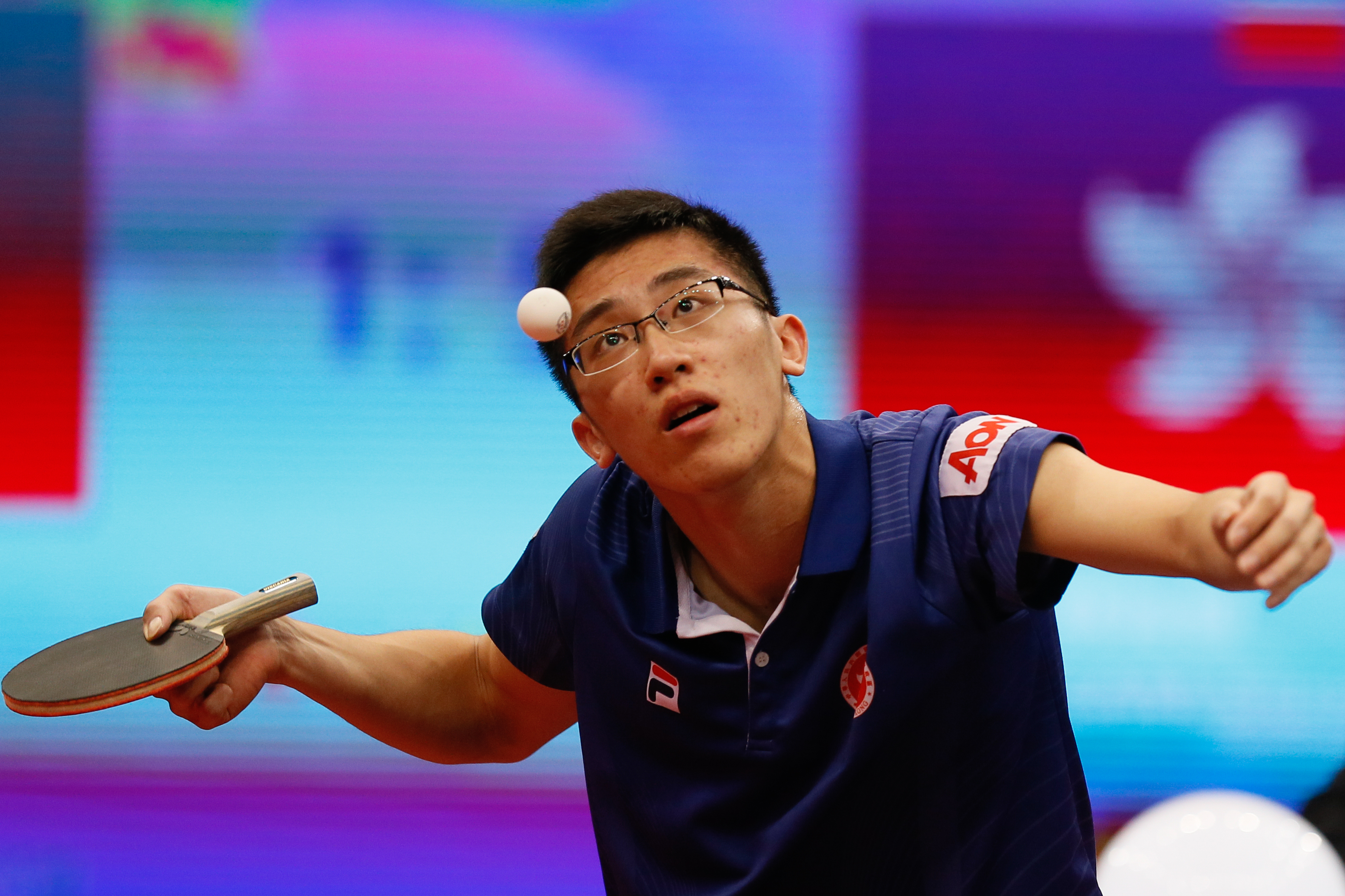 _K0K1861